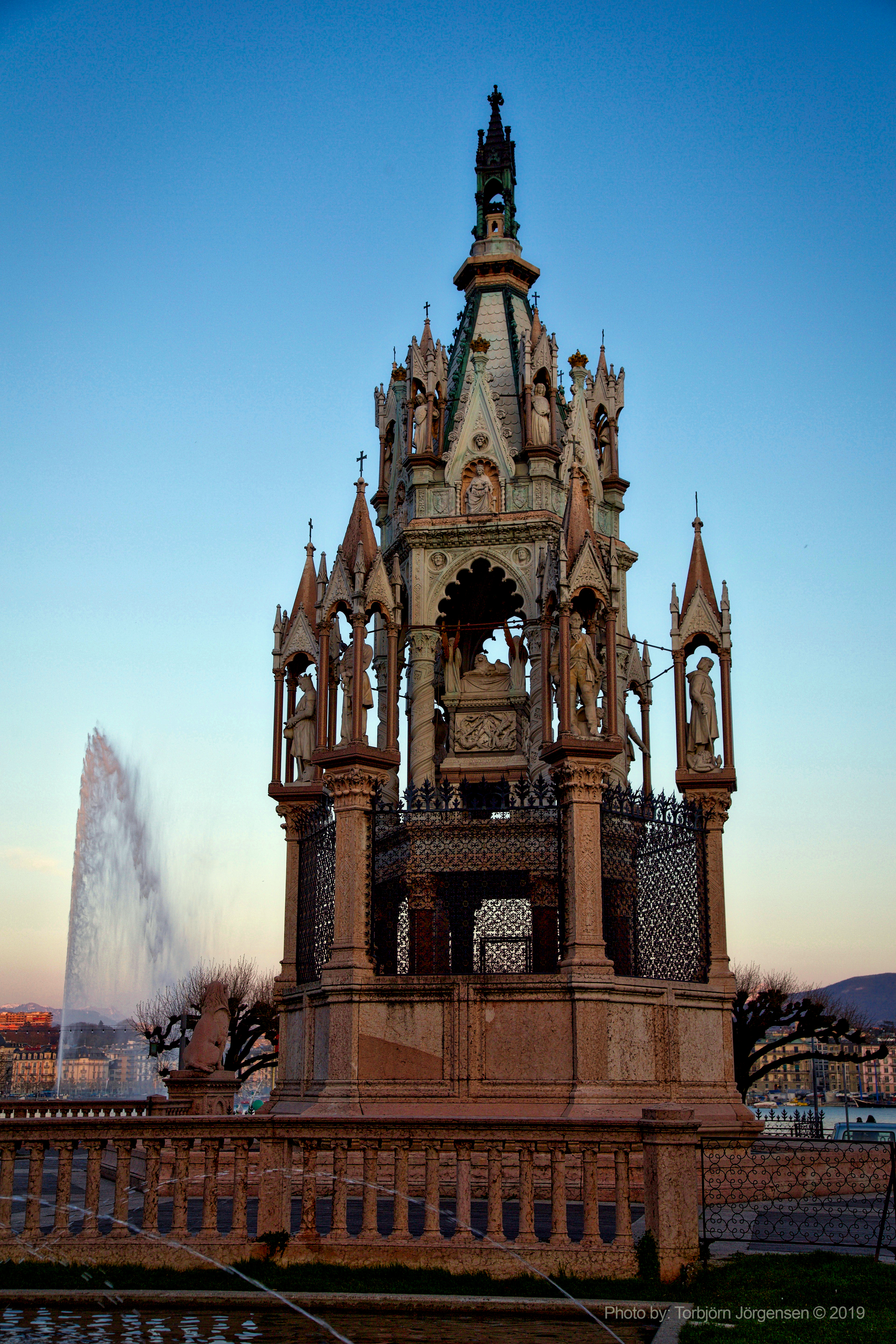 Brunswick Monument, Geneva